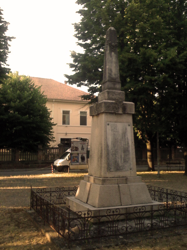 San Giuliano Nuovo, frazione di Alessandria. Monumento ai caduti